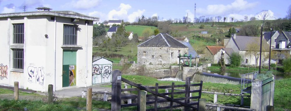 Barrage et centrale hydroélectrique à Candol près de Saint-lô sur la Vire